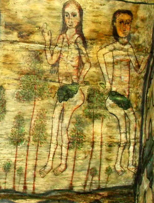 Rumunia, Desesti, wnętrze malowanej cerkwi